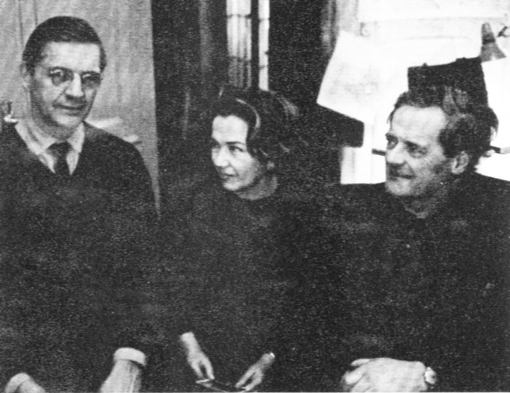 ETG-gruppen, från vänster Anders Tengbom, Léonie Geisendorf och Ralph Erskine omkring 1965